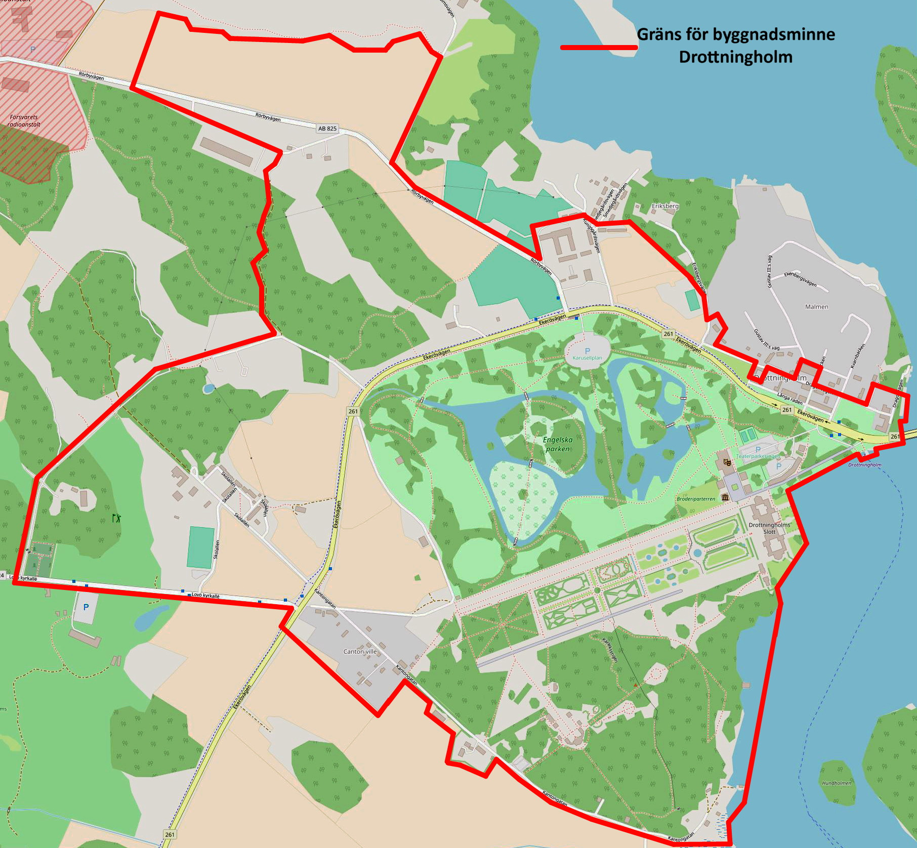 Gräns för byggnadsminne Drottningholm, källa RAÄ:s bebyggelseregister Ekerö kn, DROTTNINGHOLM 1:1 OCH RINKEBY 1:1 DROTTNINGHOLMS SLOTT. Bakgrundskarta från Open street map. Grafik Holger Ellgaard